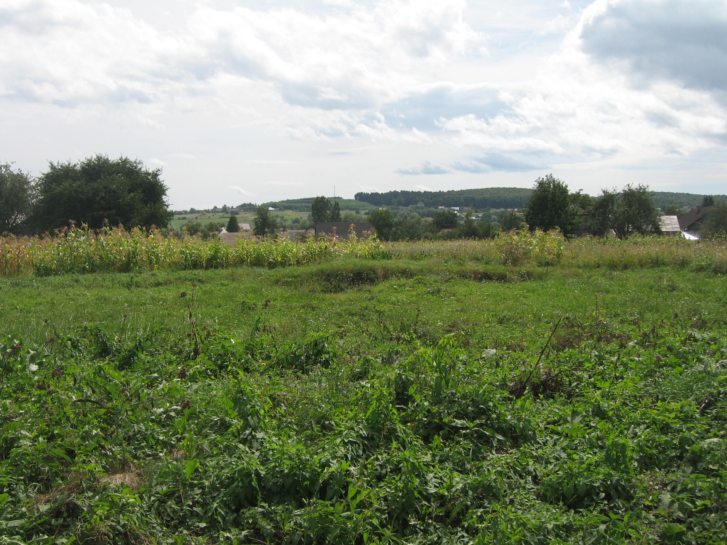 Biserica Inaltarea Sf. Cruci din Volovat